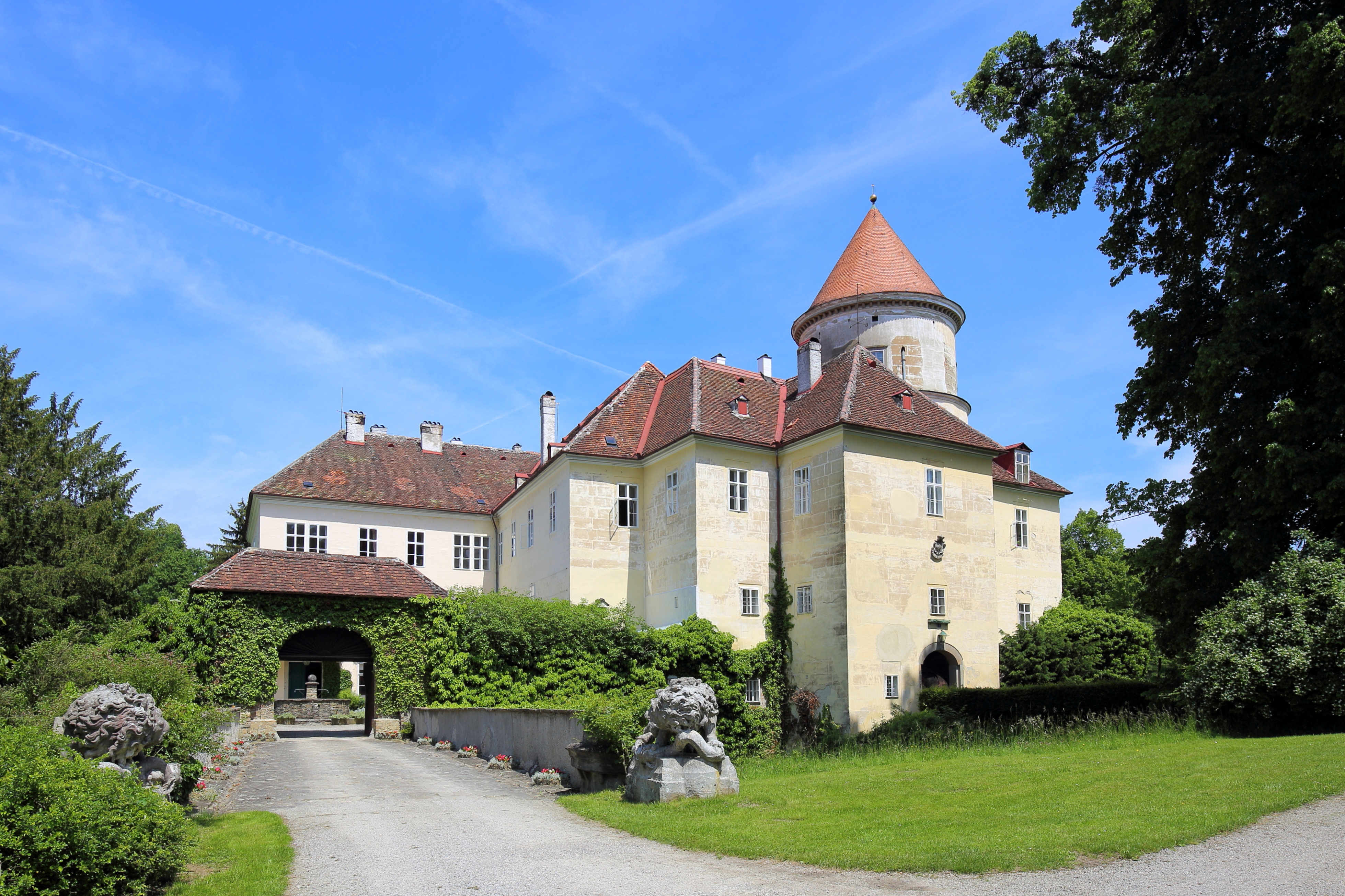 Südansicht des Schlosses Wald in der niederösterreichischen Marktgemeinde Pyhra. Eine mittelalterliche Burg, die in der zweiten Hälfte des 16. und der ersten Hälfte des 17. Jahrhunderts zu einem Renaissance-Wasserschloss umgebaut wurde. Das "Altschloss" ist eine dreigeschoßige Anlage mit 4 Trakten in unregelmäßiger Anordnung, die im Südosten vom mittelalterlichen Bergfried überragt wird. Im 19. Jahrhundert wurde das Schloss mehrmals verändert und erweitert; unter anderem wurde im Westen das "Neuschloss" (ein Trakt) angebaut und der Bergfried (mit einer Mauerstärke von ca. 3m) um ein Geschoß erhöht sowie mit einem Kegeldach versehen.